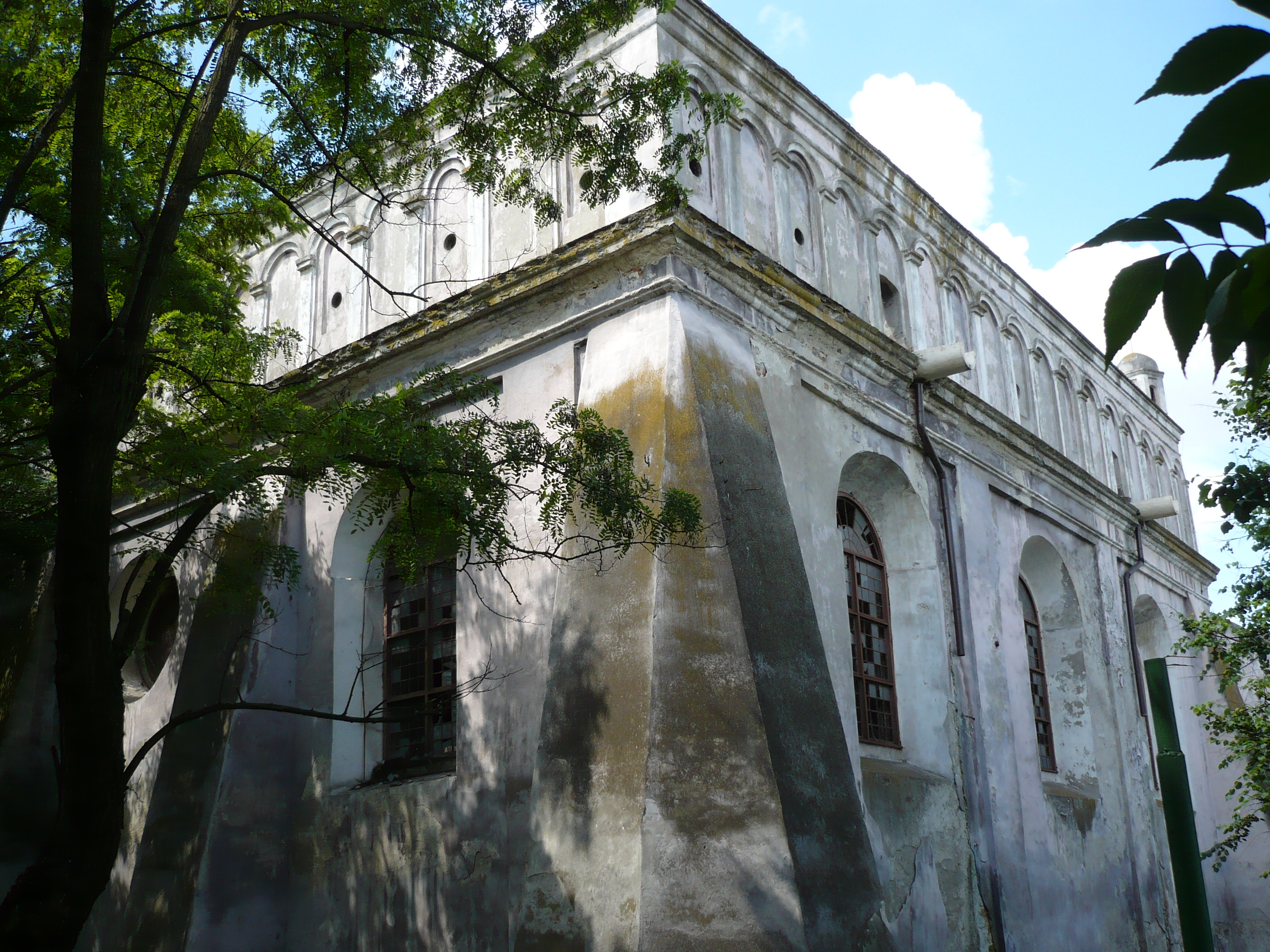 Synagoga, fragment